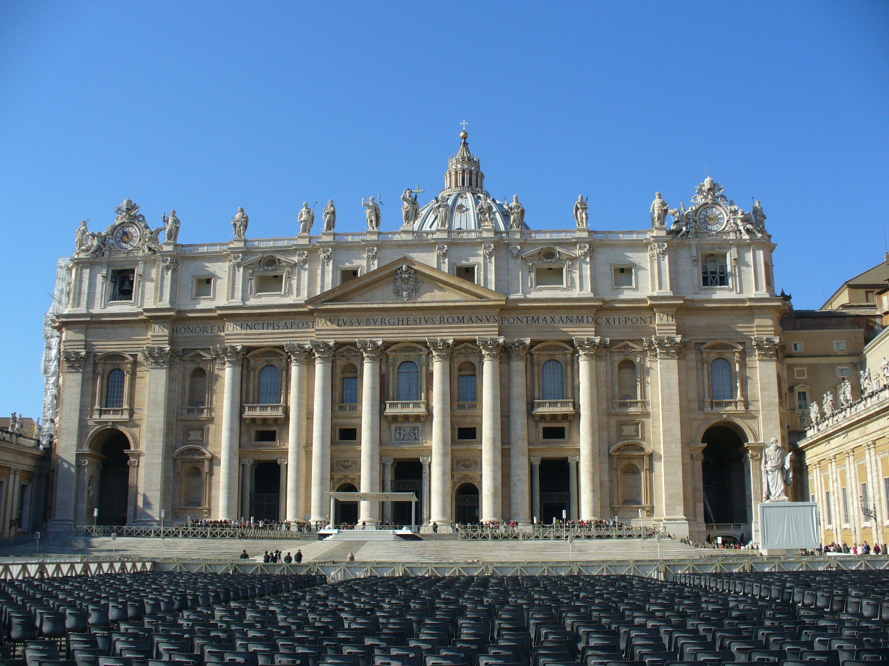 Vaticano